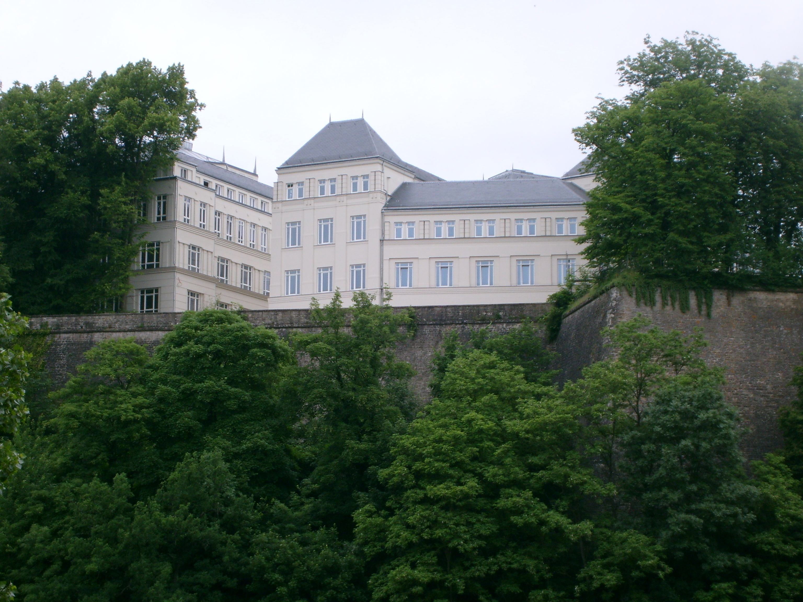 D'Friddensgeriicht am Süden vun der Cité judiciaire, Vue vum Kulturministère aus - 3. Juni 2008.